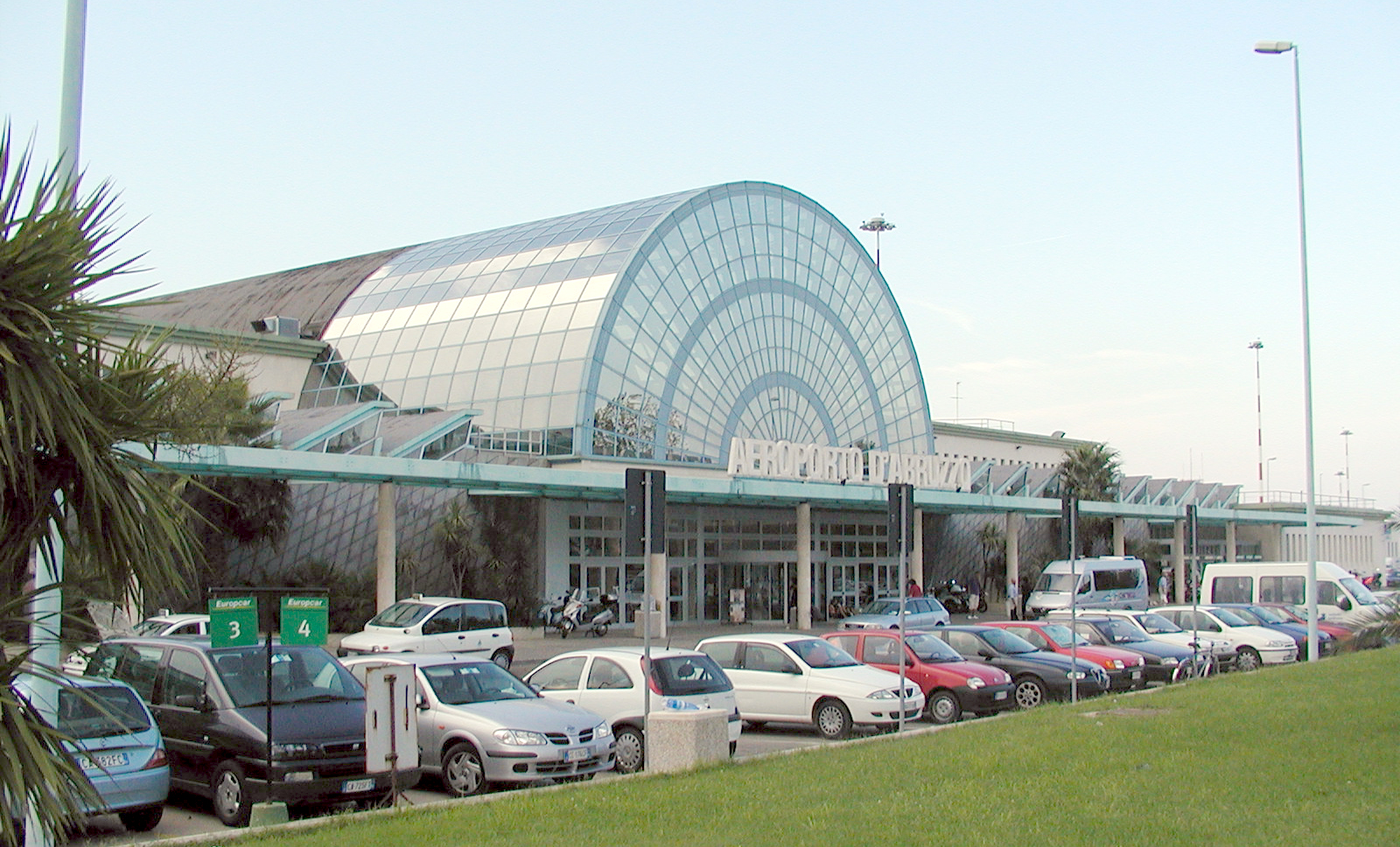 Der Flughafen